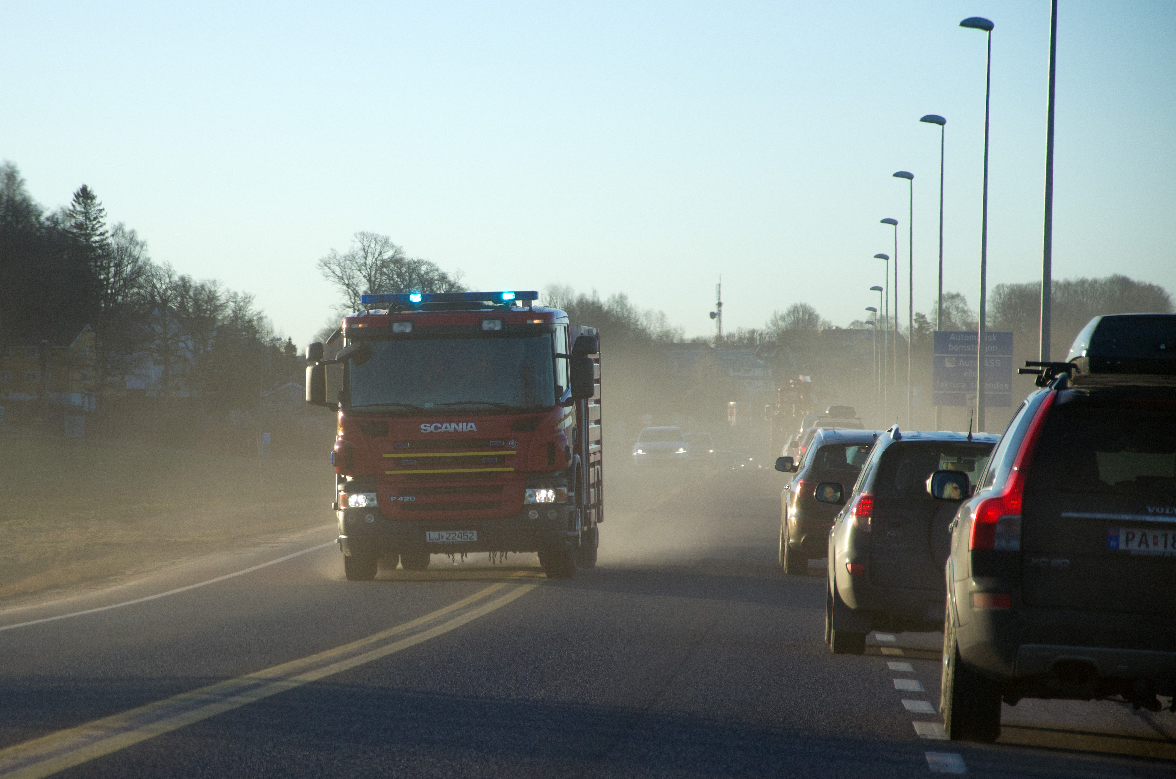 Brannutrykning på Jarlsberglinna, Tønsberg